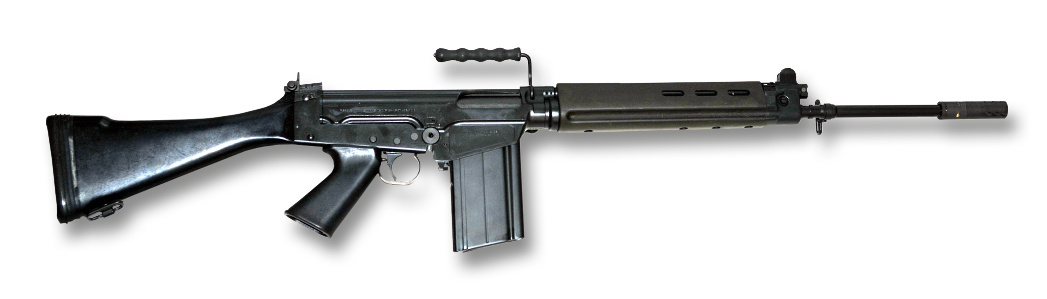 Sturmgewehr FN-FAL (Belgien)